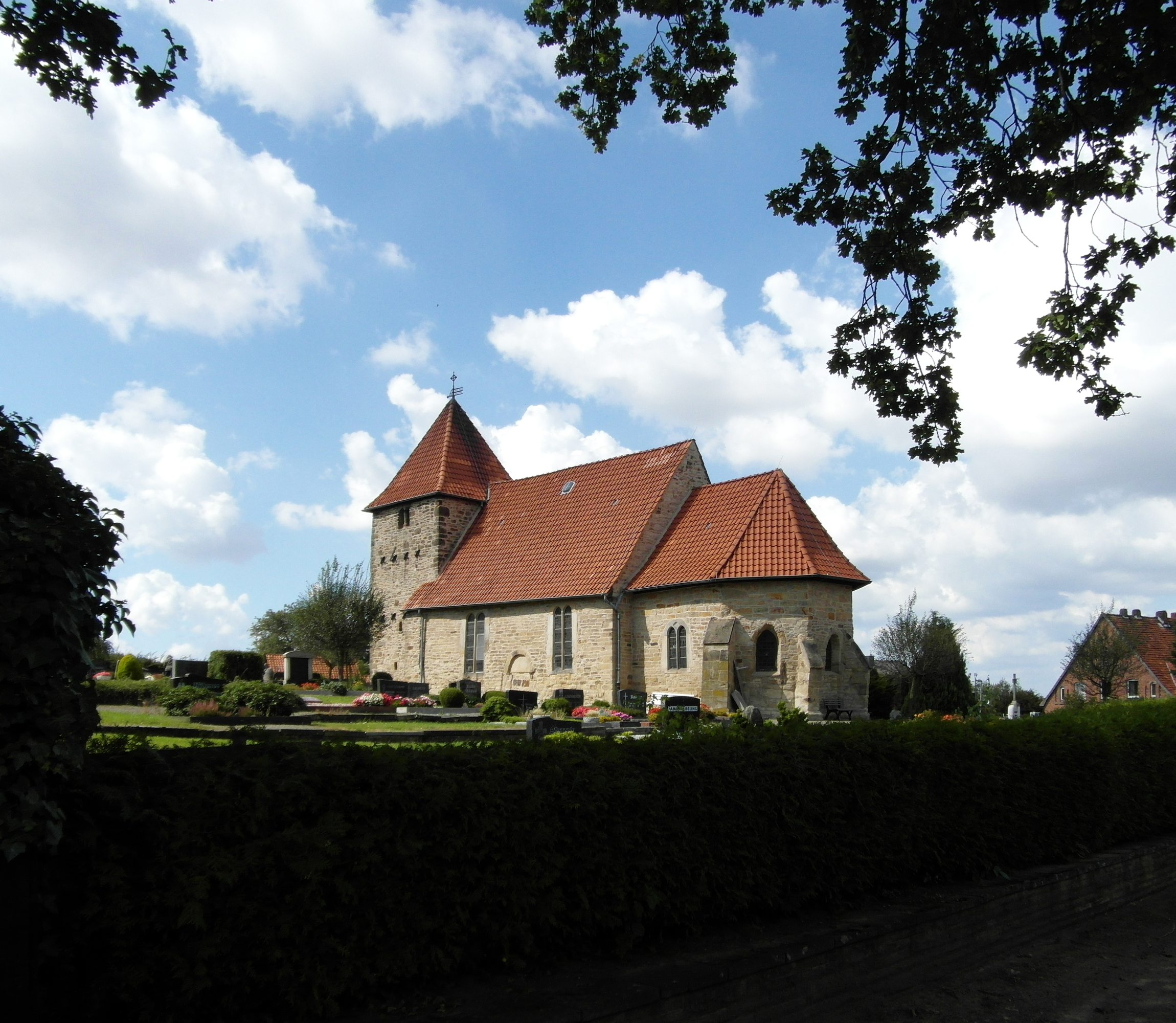 Die St.-Alexandri-Kirche stammt im Ursprung aus dem 12. Jahrhundert, Mauerreste auf der Südseite der Kirche belegen das. Allerdings stammen wesentliche Teile der Kirche aus dem 13. Jahrhundert.